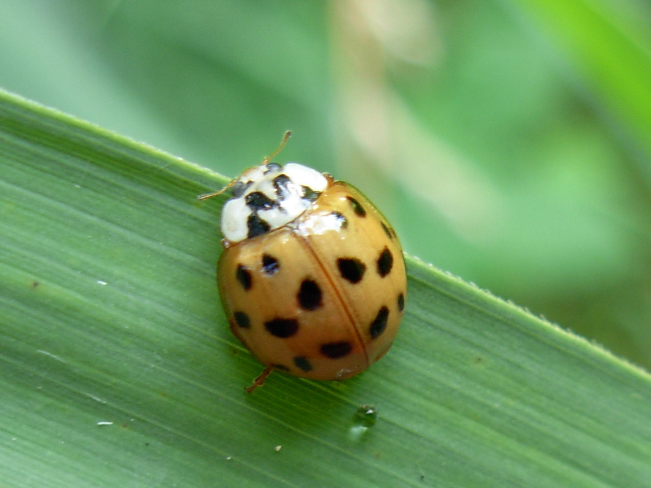 Harmonia axyridis.